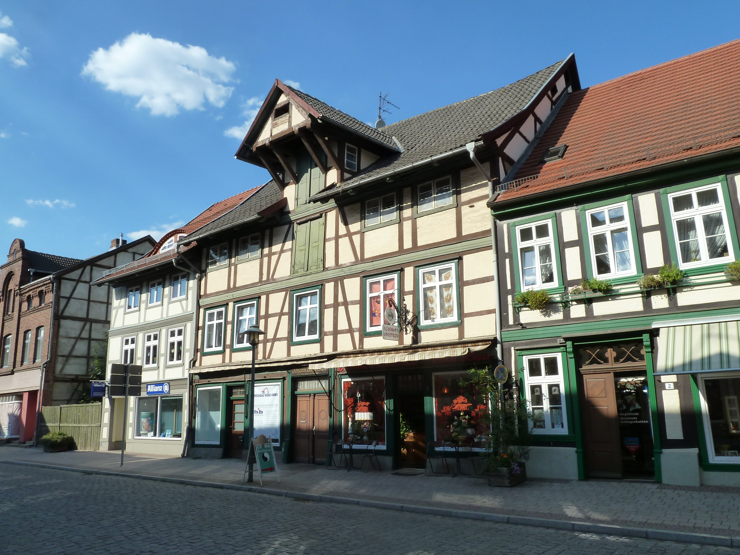 Grabow, denkmalgeschütztes Wohnhaus Marktstr 3